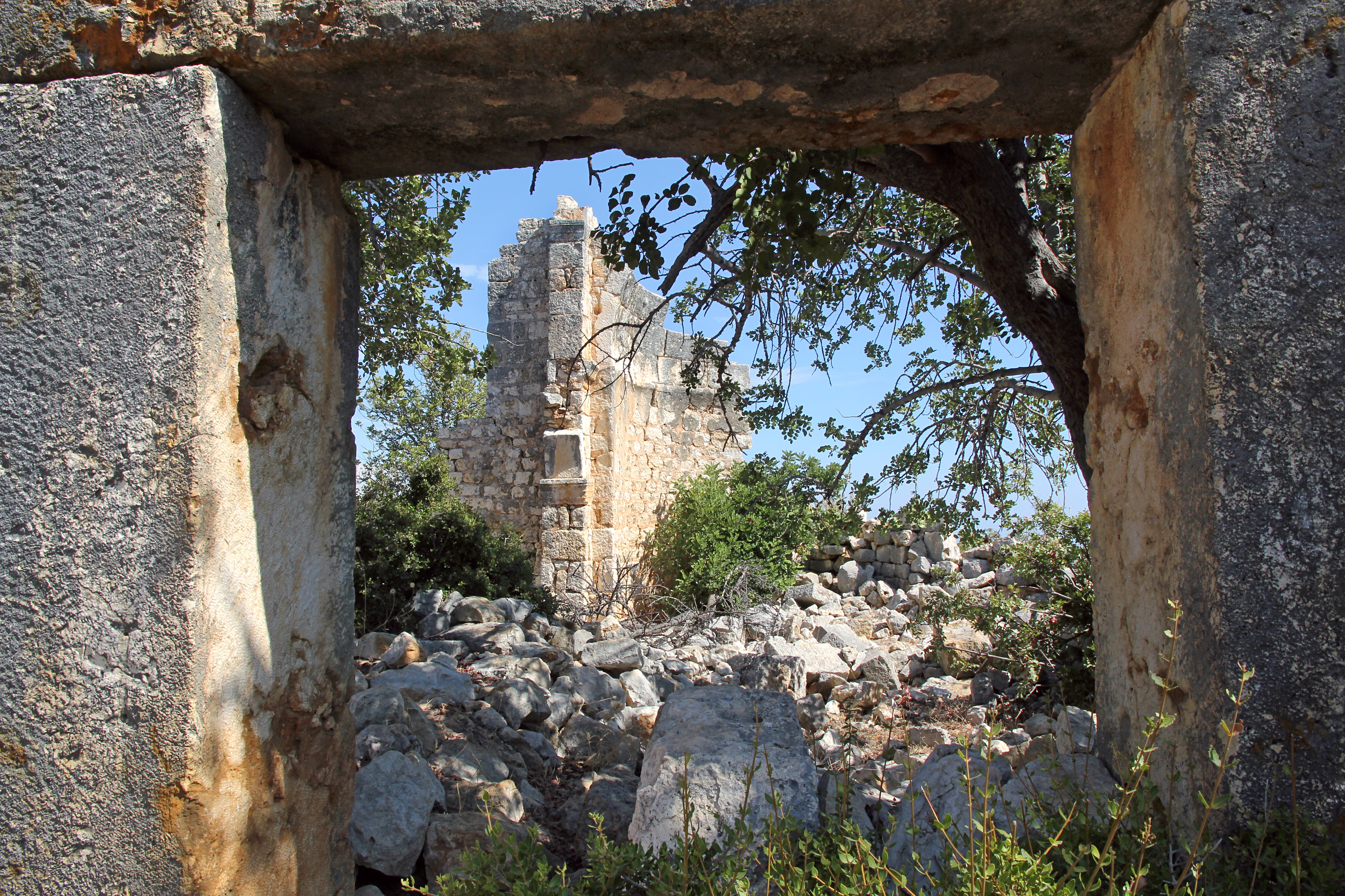 Demirciören, hellenistisch-frühbyzantinische Siedlung im Rauhen Kilikien, Südtürkei, Eingang und Apsis der Kirche